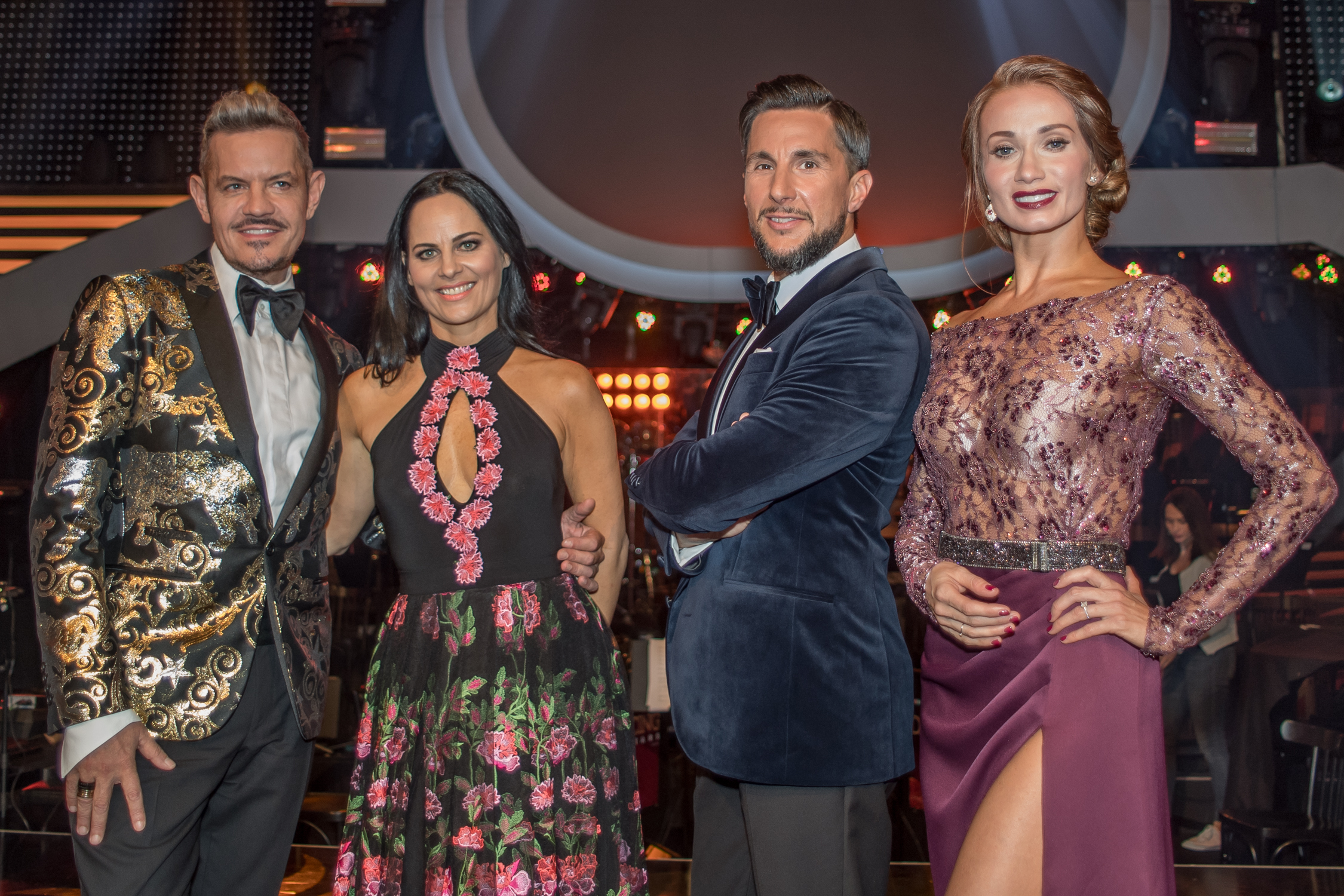 ORF Dancing Stars am 31. März 2017. Bild zeigt die Jury: Dirk Heidemann, Nicole Hansen, Balazs Ekker und Karina Sarkissova.